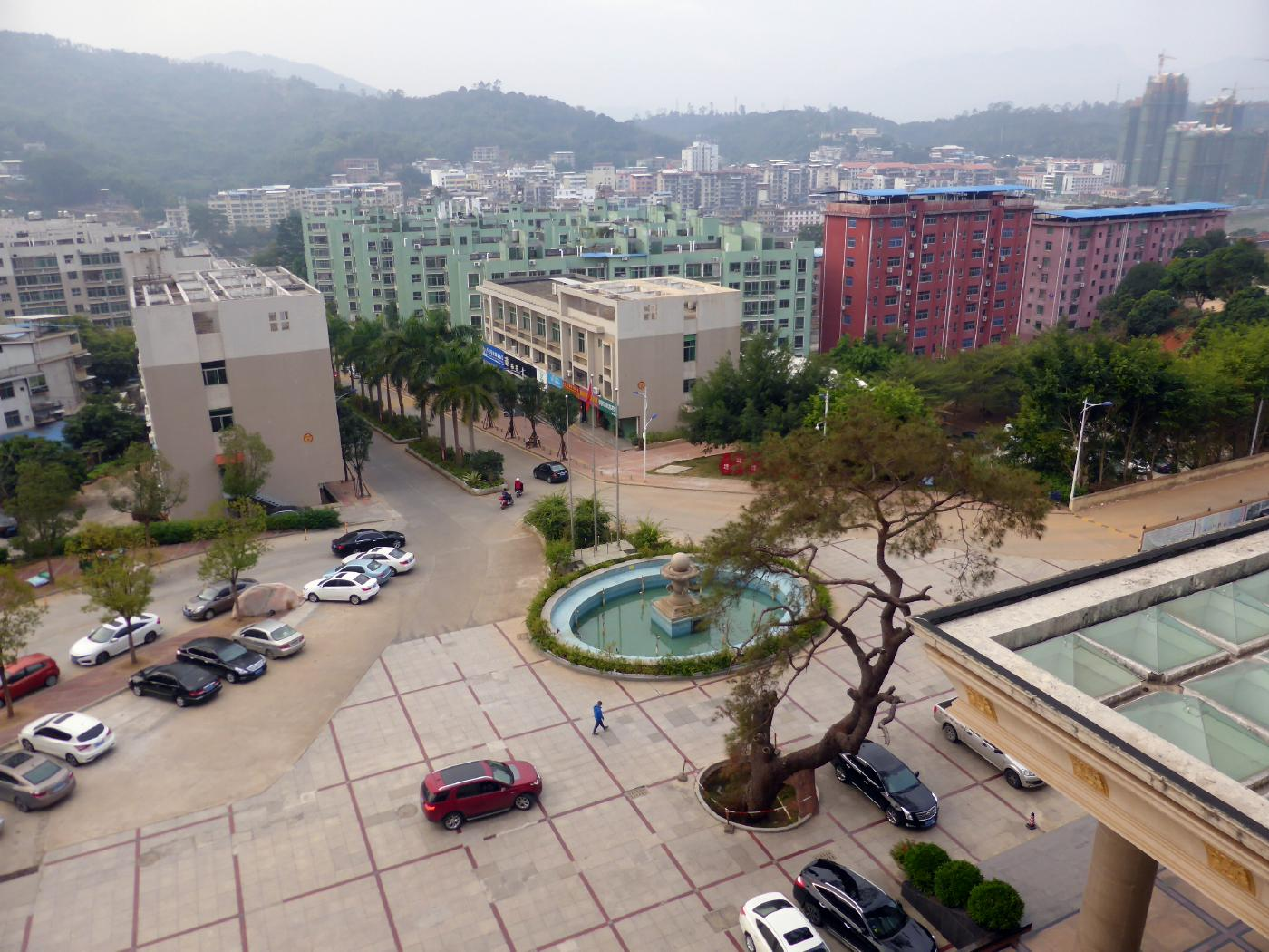 四星級の華安大酒店から見る住宅街